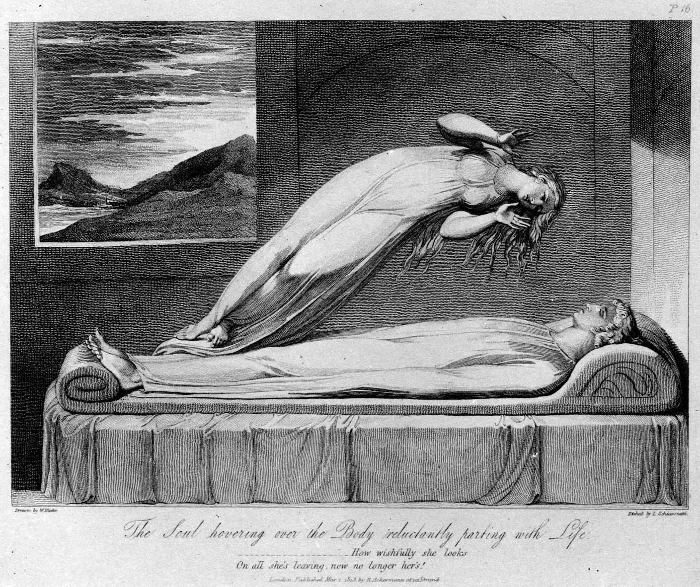 Druck "The soul leaving the body"